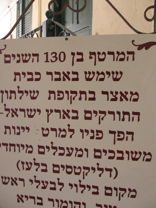 עברית...שפה קשה